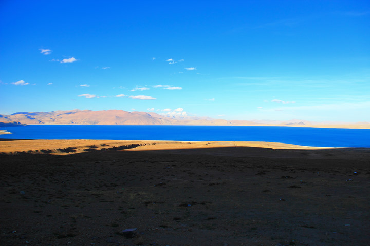 西藏佩枯错